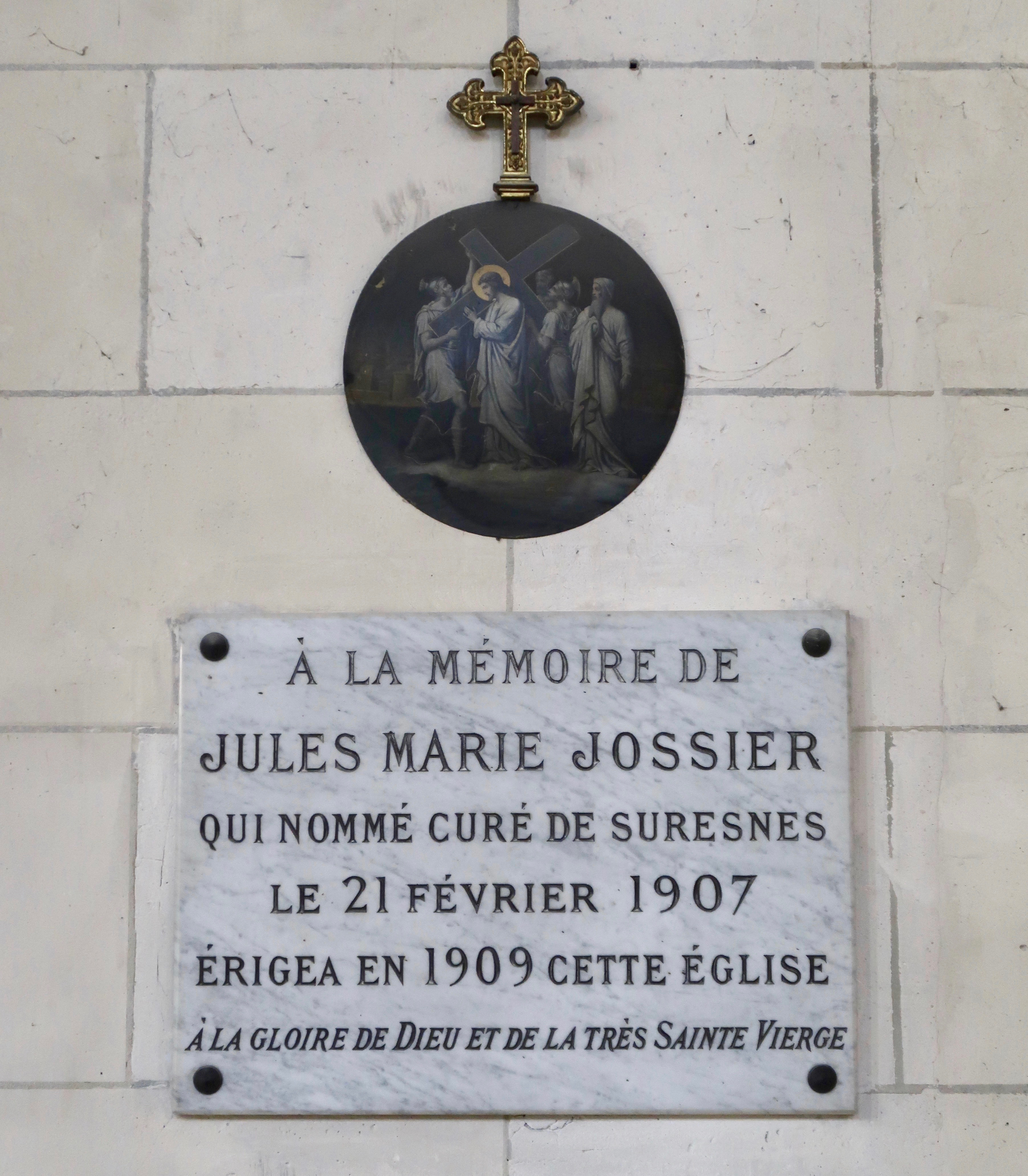 Plaque en hommage au curé Jules Marie Jossier et étape du chemin de croix, en l'église du Cœur-Immaculé-de-Marie de Suresnes (Hauts-de-Seine).